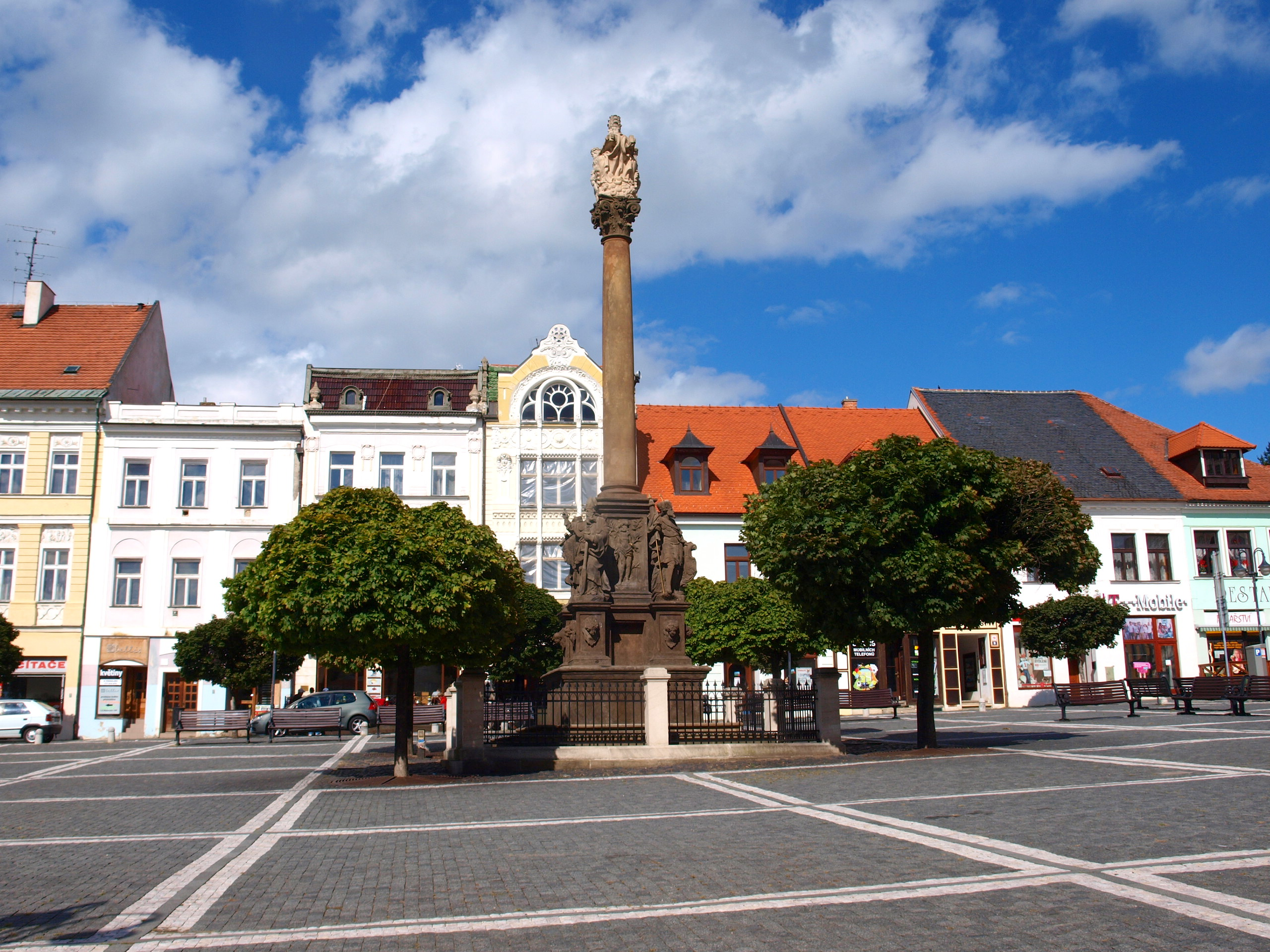 Česká Lípa